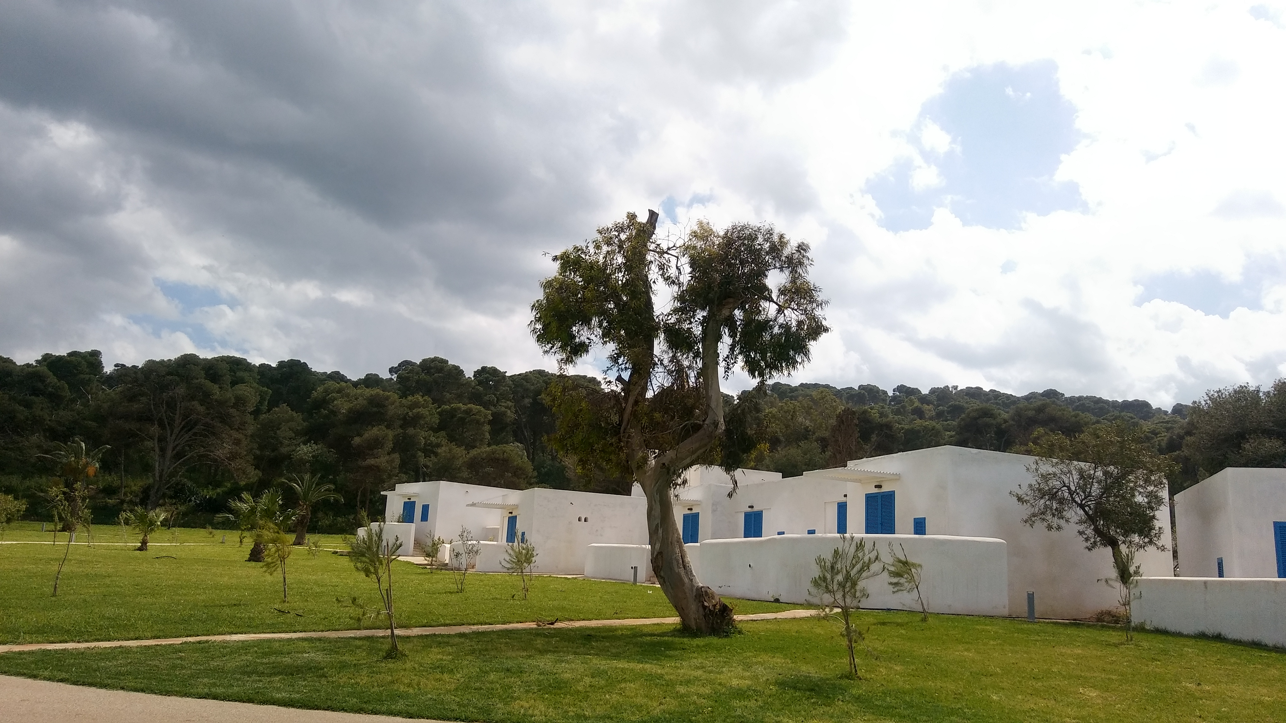 Corne d'Or